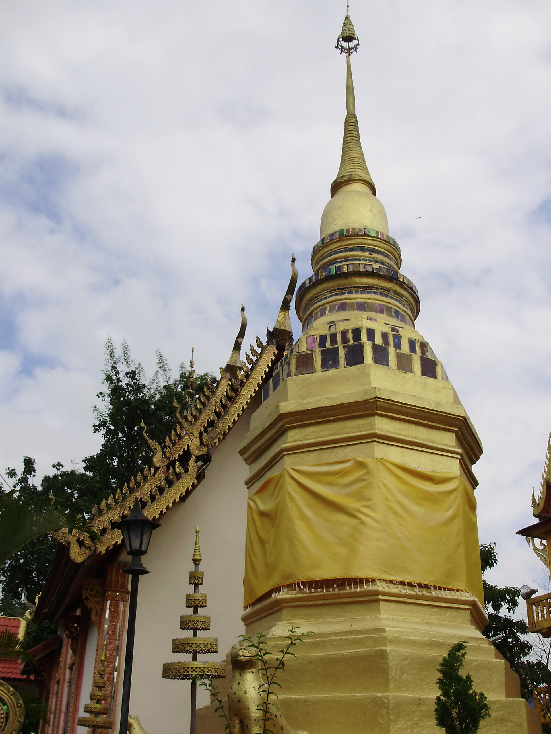 วัดพระหิน ต.ม่วงคำ อ.พาน จ.เชียงราย